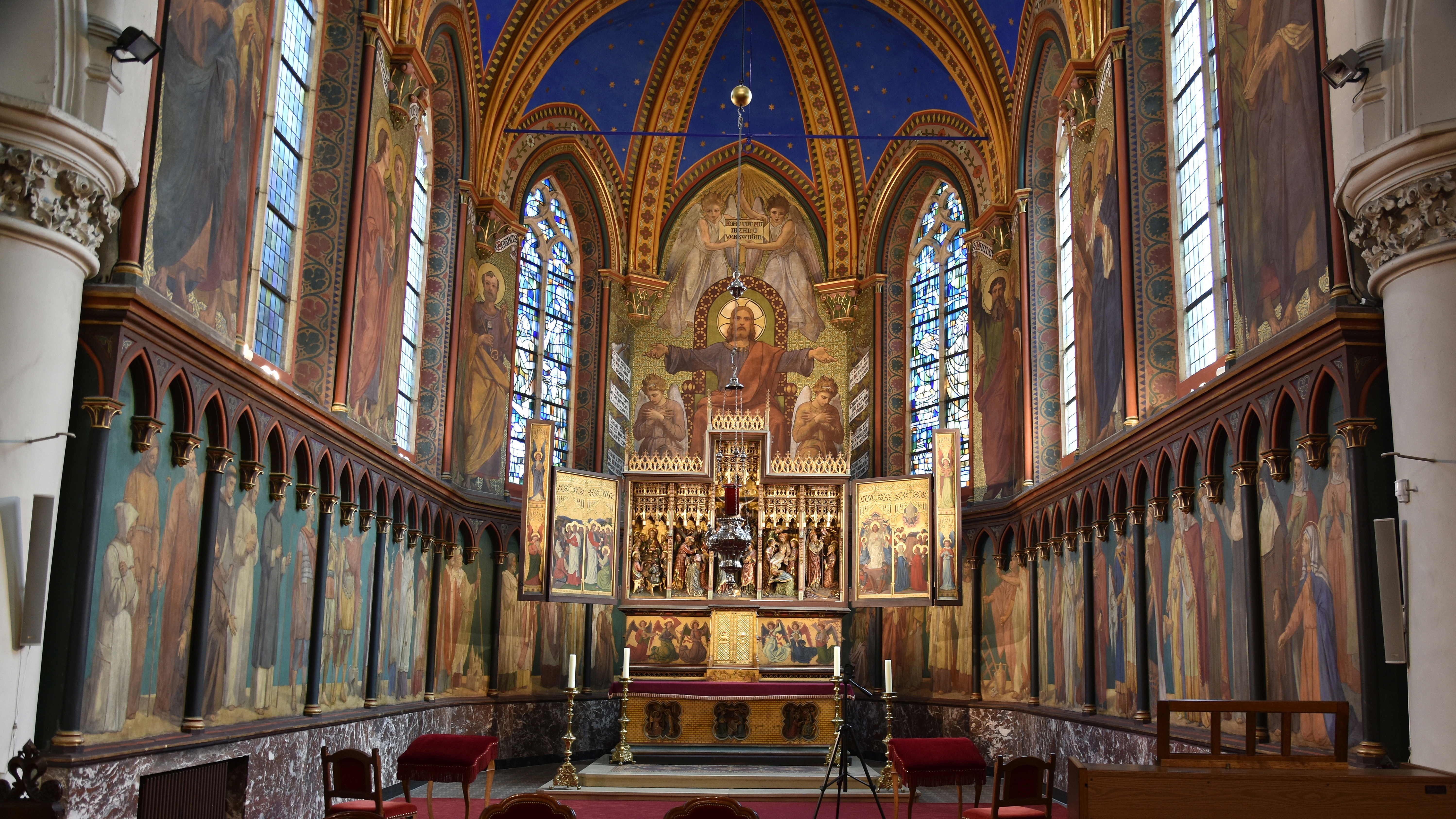 Heilige Kerstkerk Gent 22-06-2019 This photo of immovable heritage has been taken in the Flemish Region